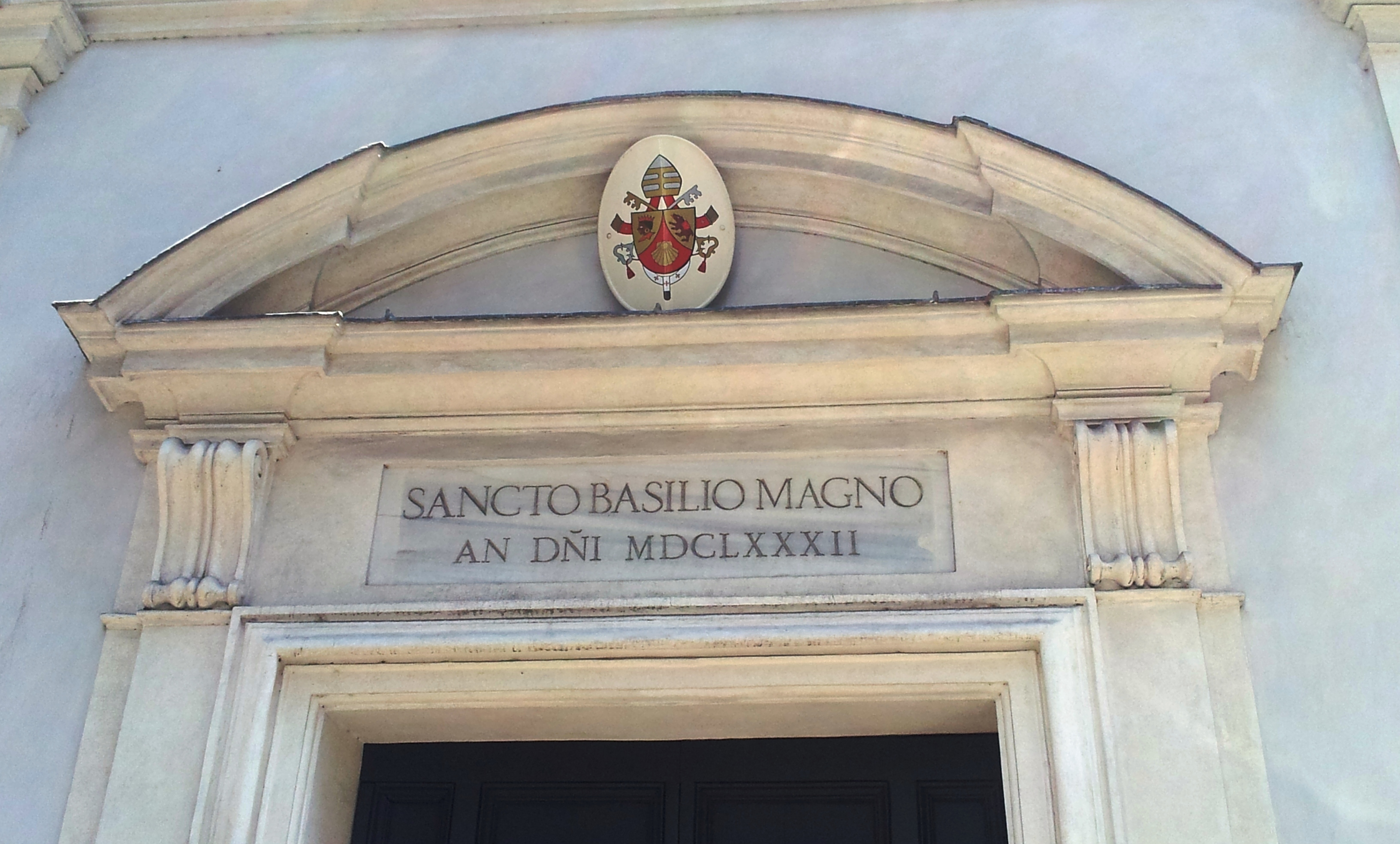 Iscrizione latina in cima al portone della chiesa di San Basilio agli Orti Sallustiani (Roma)